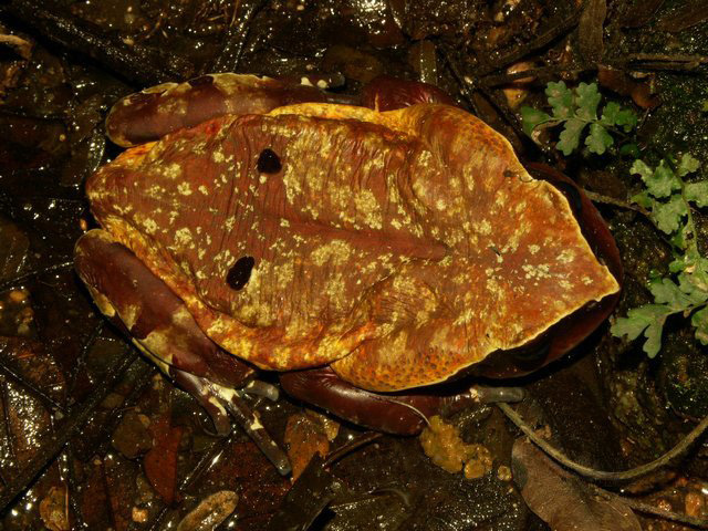 Bufo superciliaris